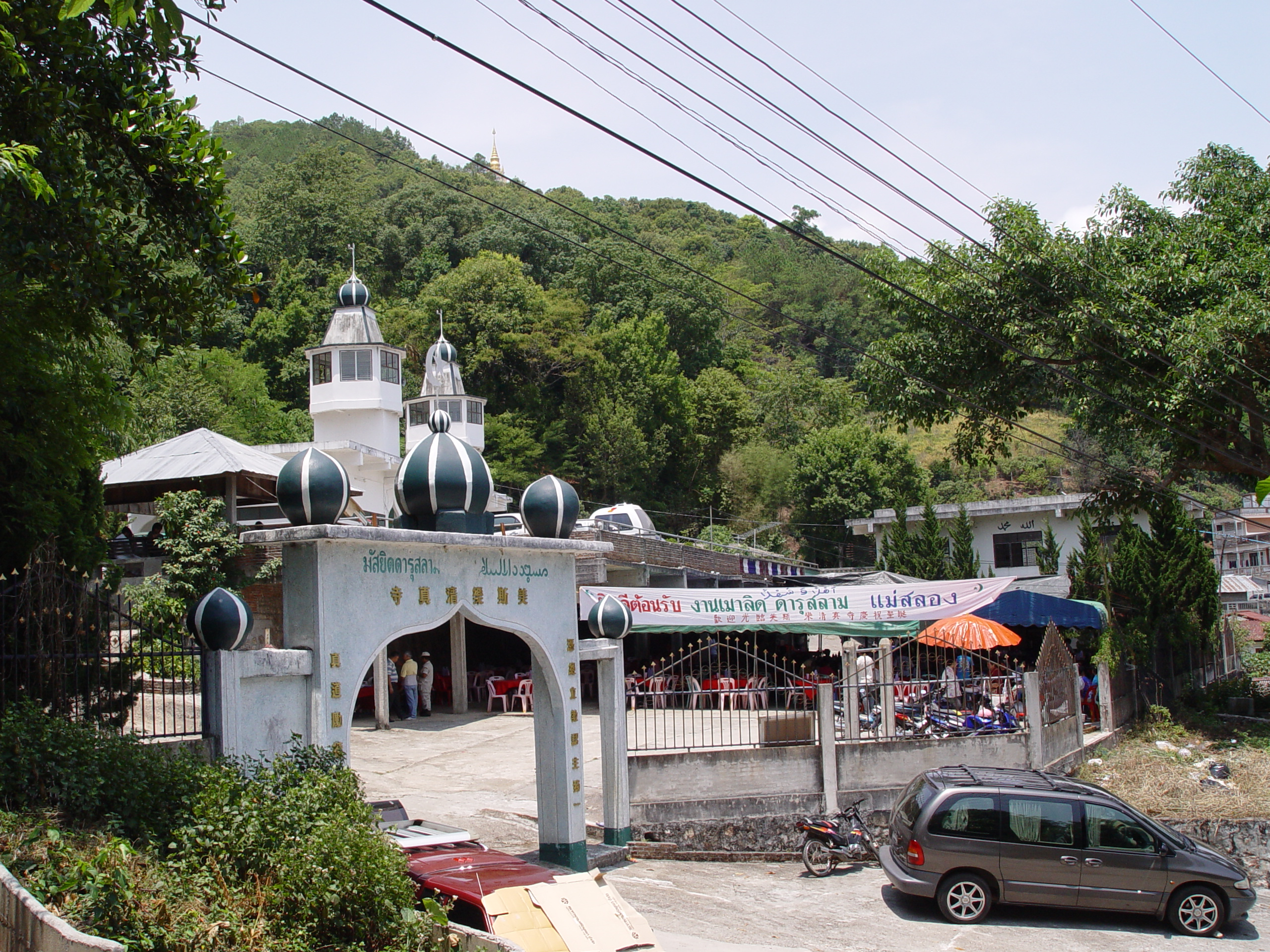 Drusalam Mosque, Doi Mae Salong, Chiang Rai